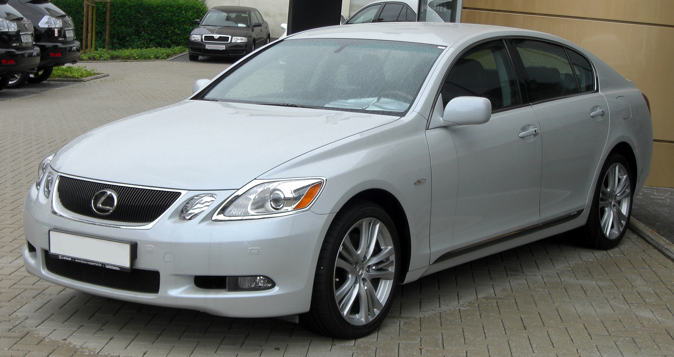 Lexus GS 450h